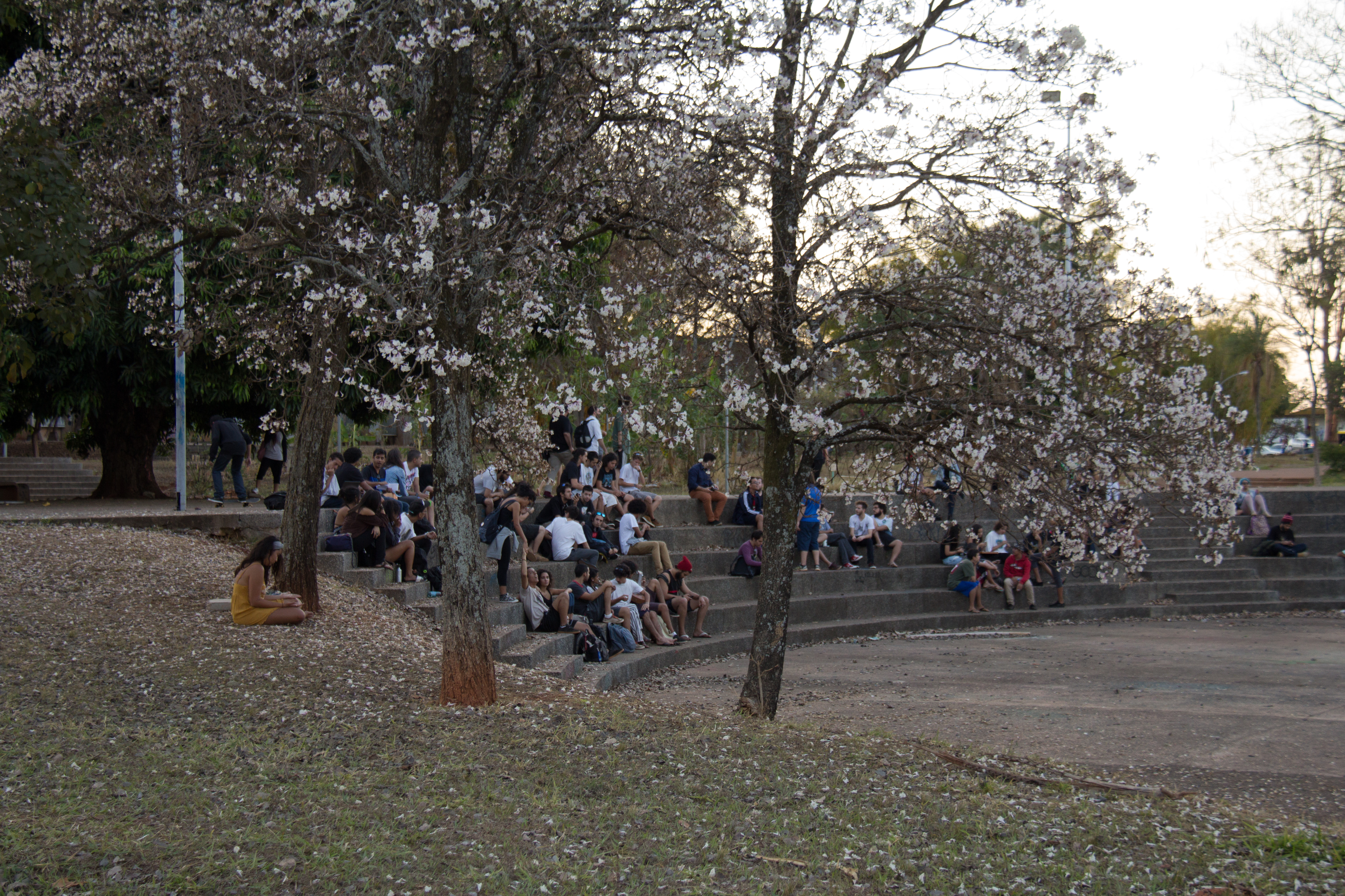 Foto:Beatriz Ferraz/Secom UnB